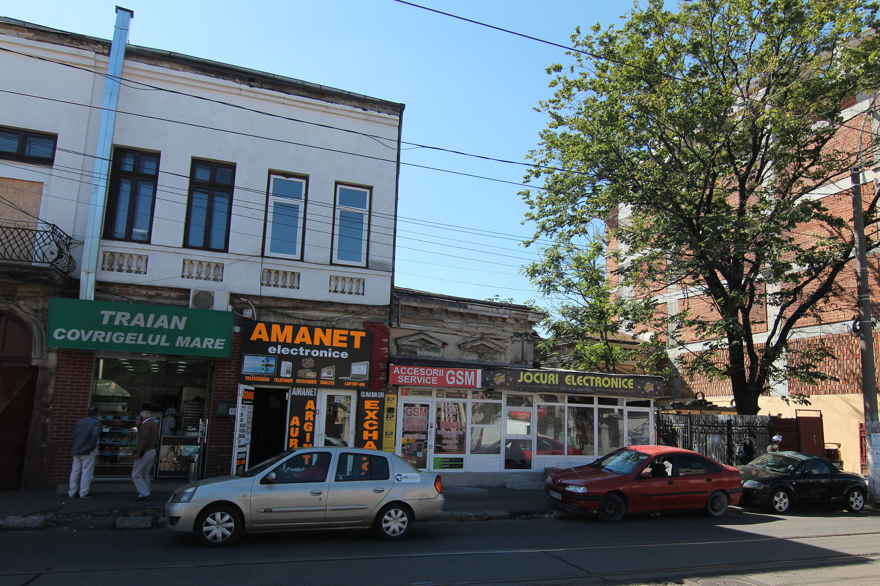 Casă pe Calea Călărașilor